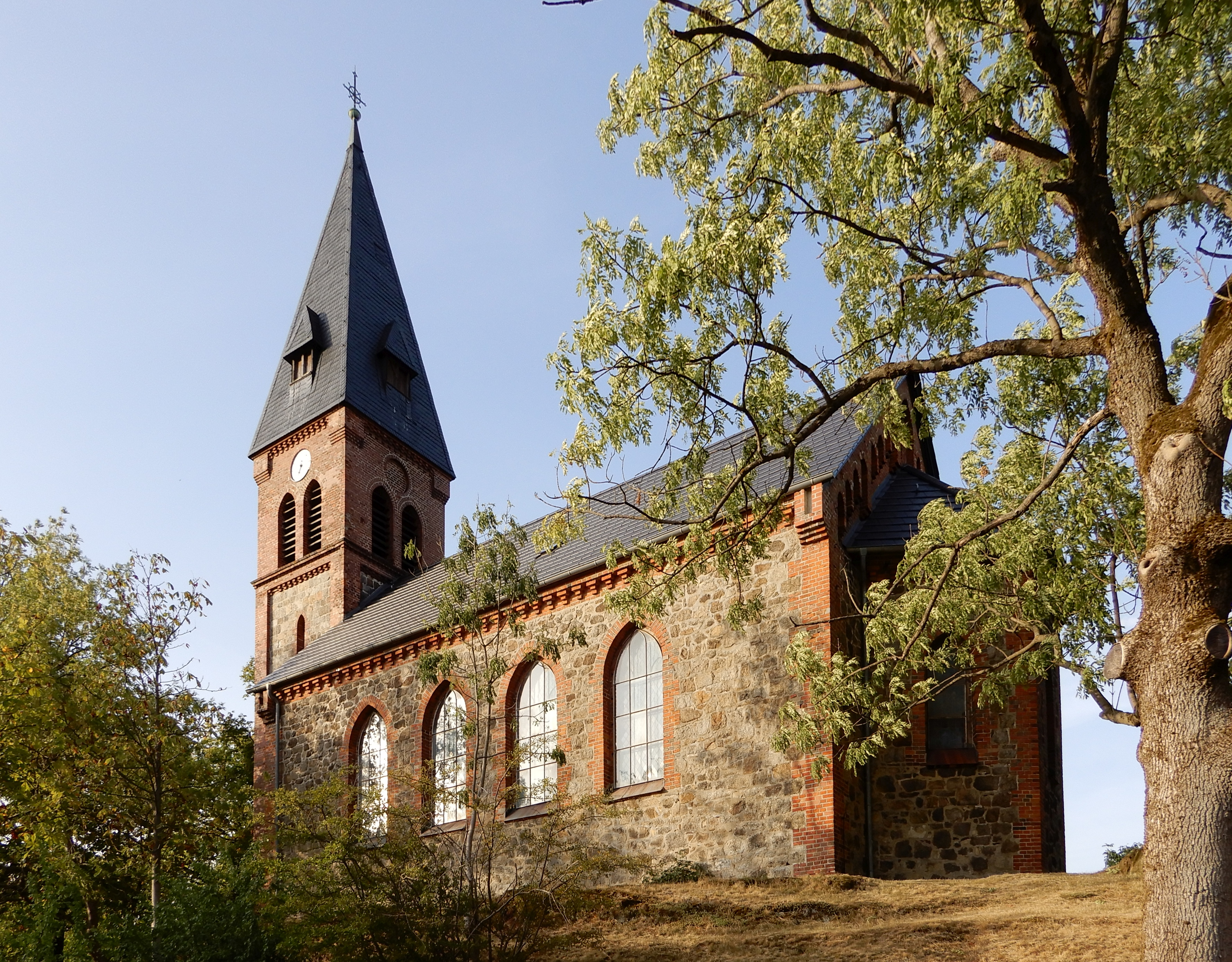 Bonhoeffer-Kirche in Friedrichsbrunn